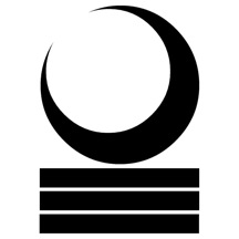 月下の三つ引両紋。関東の成田氏ほかが使用